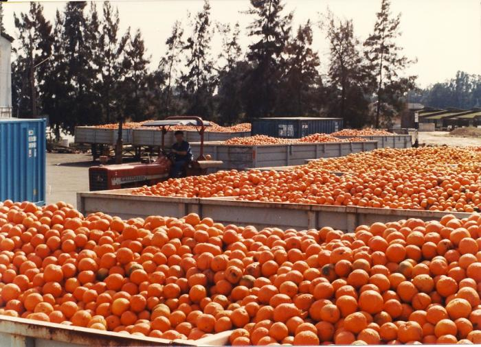 גן-שמואל - מיכלי תפוזים במגרש מפעל המיץ